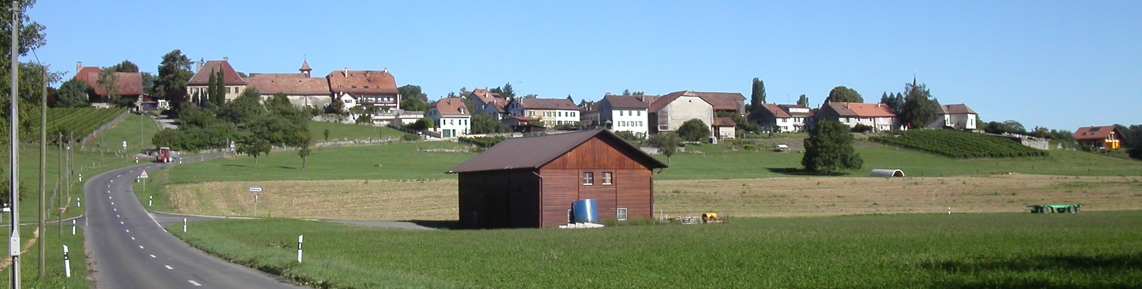 Colombier, canton de Vaud, Suisse. Auteur : Marc Mongenet Date : 18 août 2006